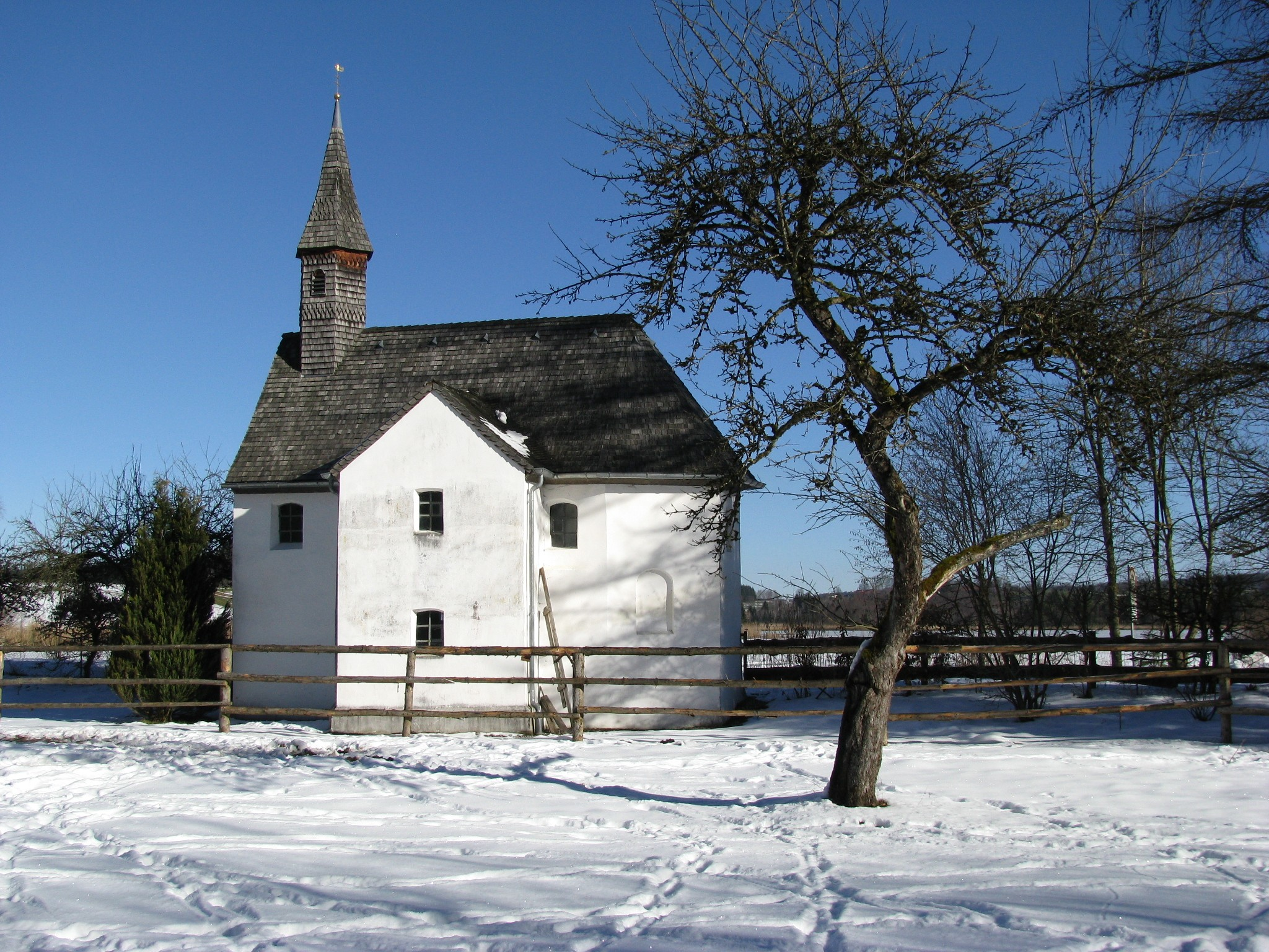 Kapelle Mariä Heimsuchung in Weihermühle, Gemeinde Egling, erbaut um 1700